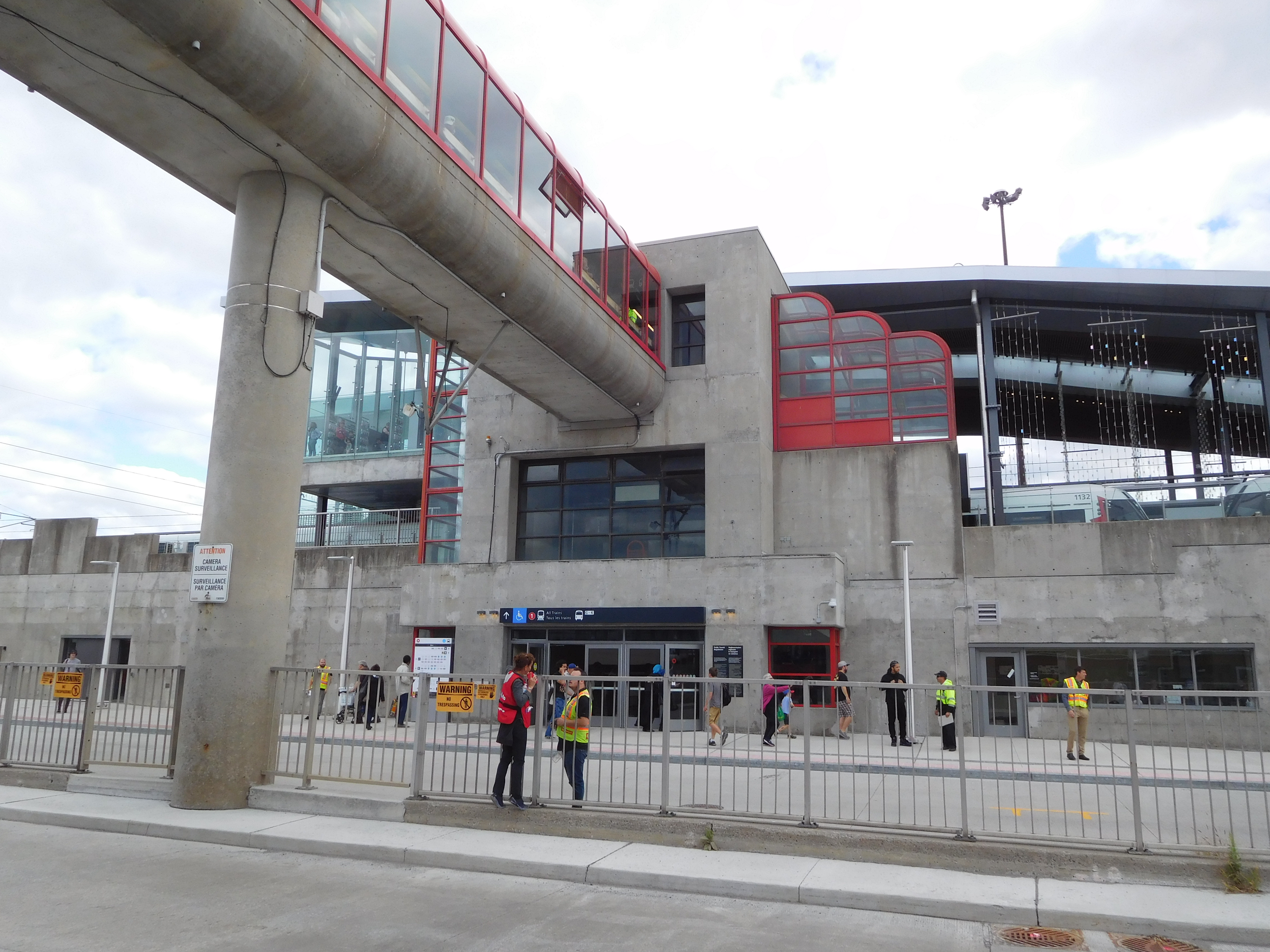 Station Blair de la ligne de la Confédération à Ottawa